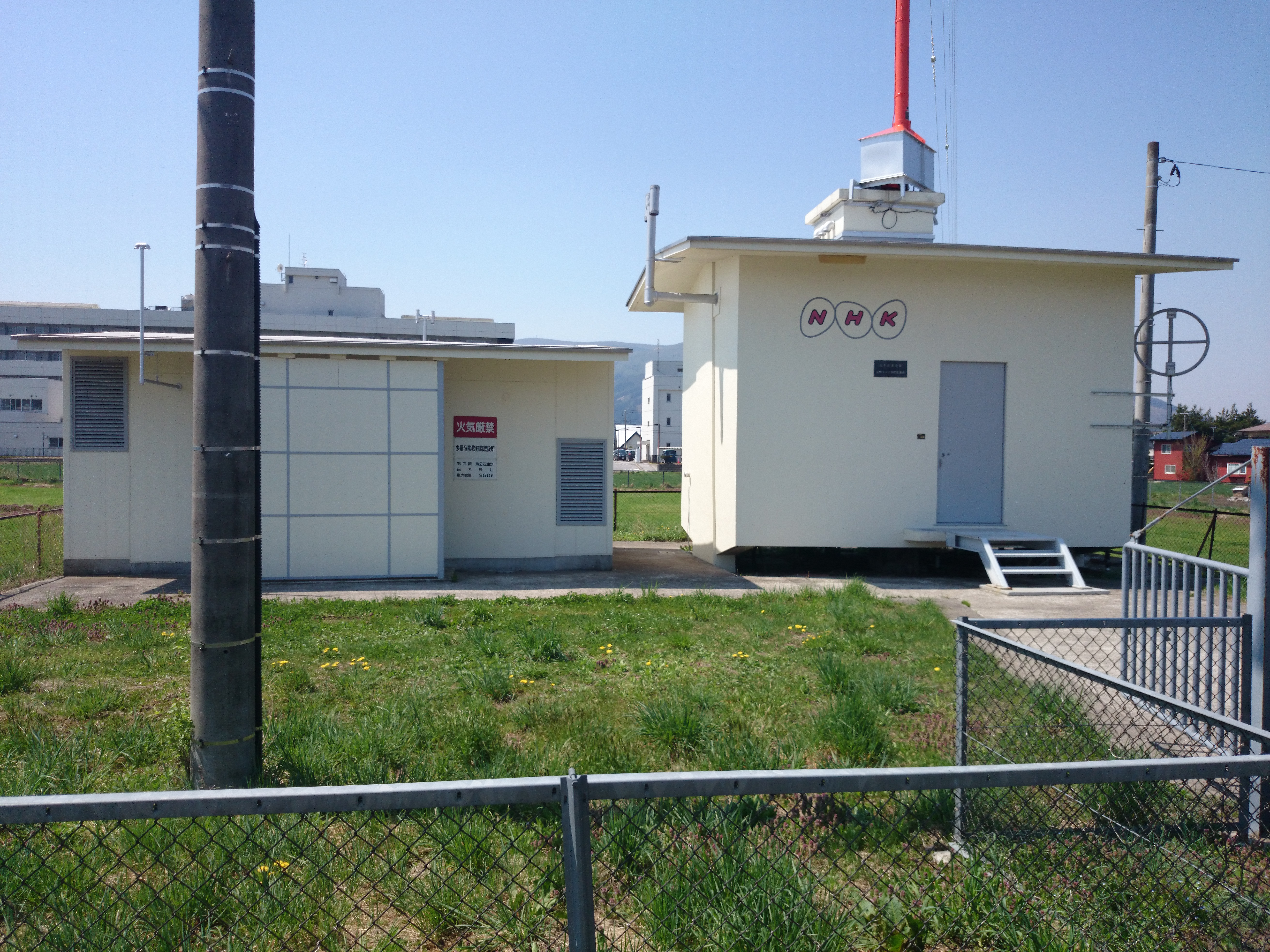 NHK遠野送信所１